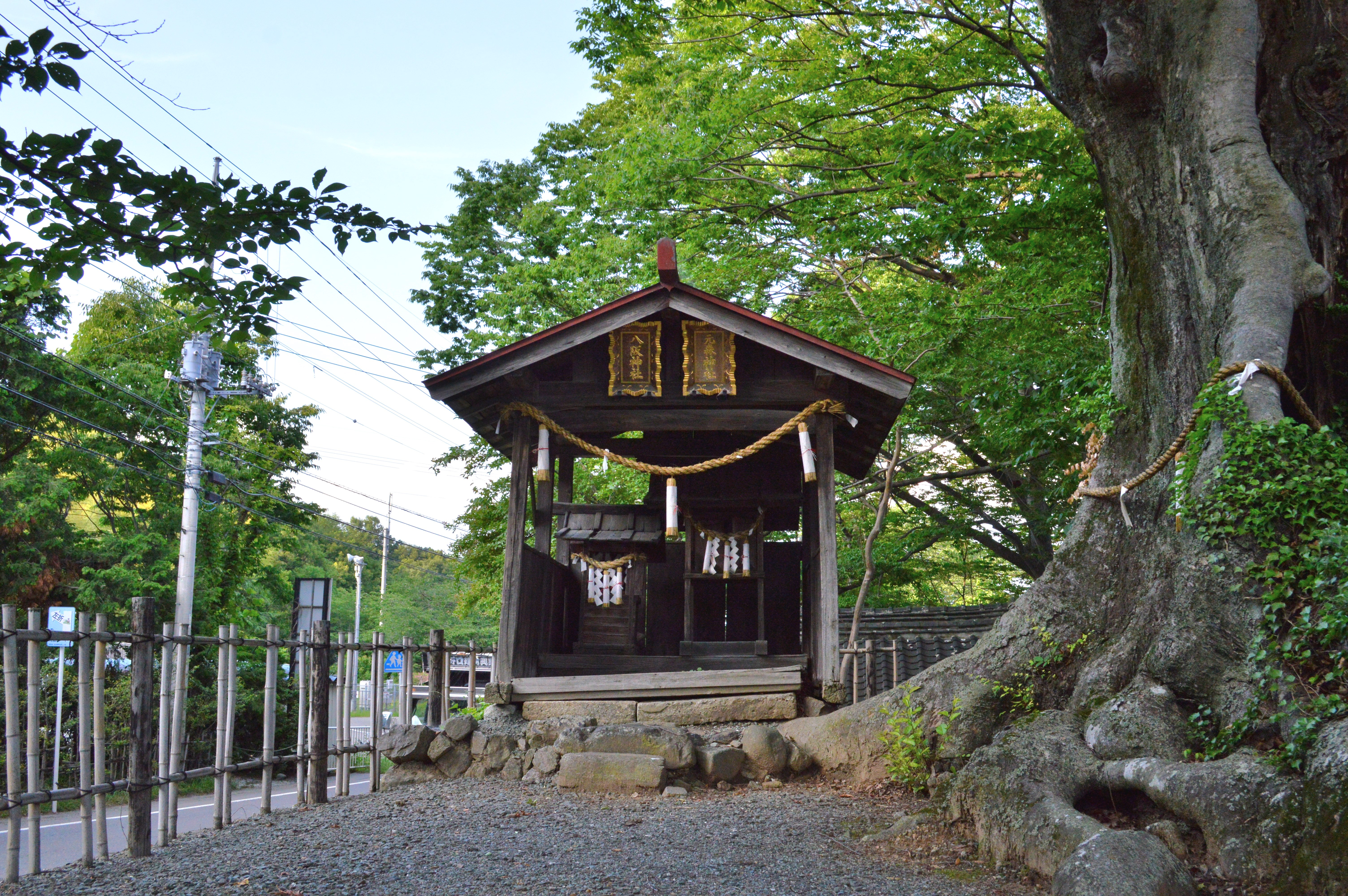 金鑚神社境外社 元森神社